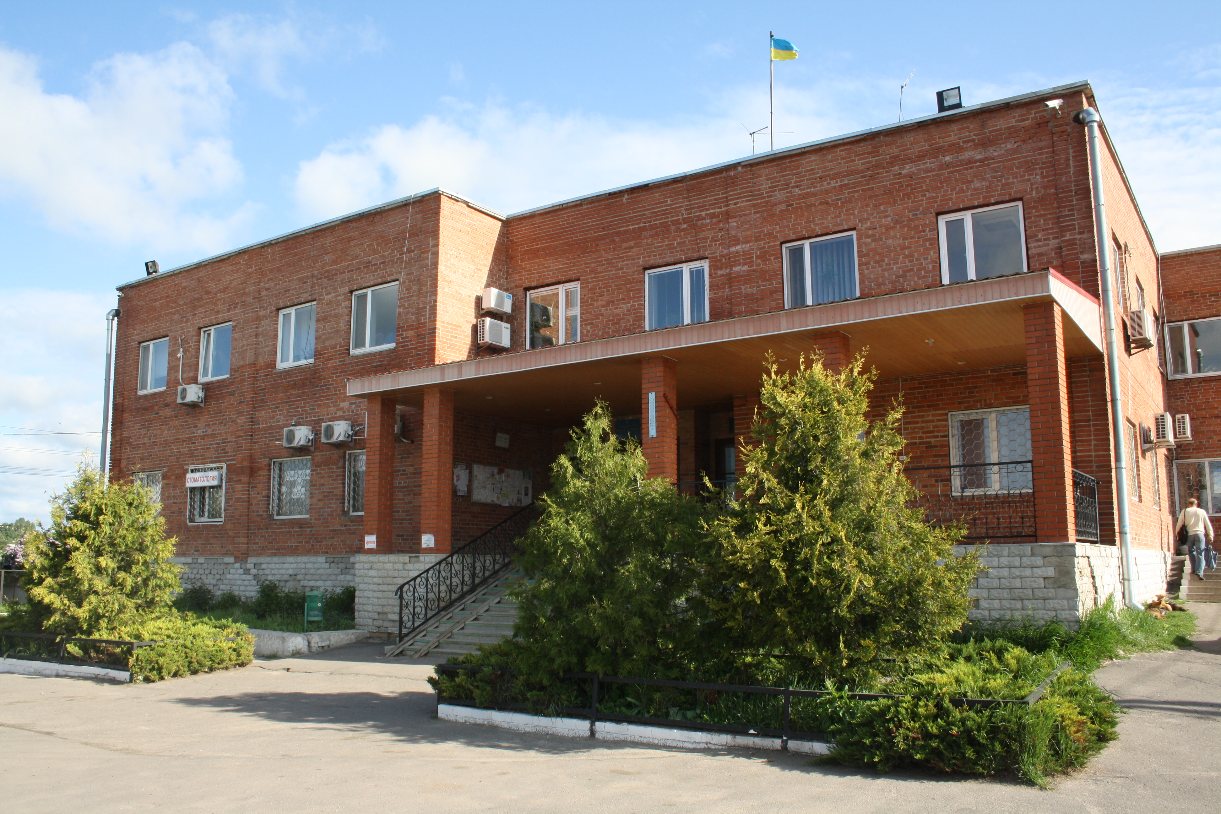 Будівля сільської ради і відділу міліції, Черкаська Лозова, вид справа.